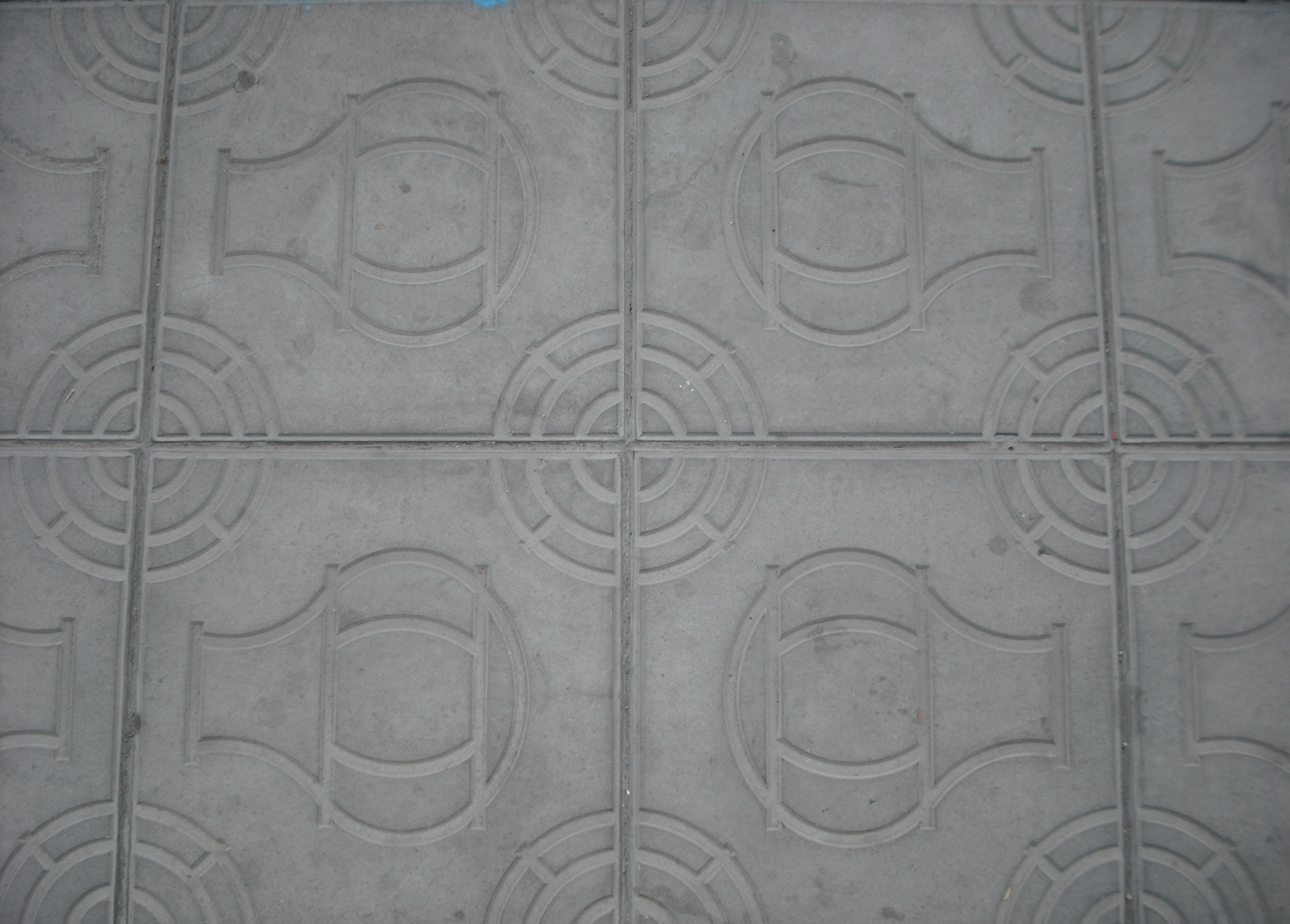 Losetas situadas en la calle Navarro Santafé de Villena, con el motivo del frasco del Tesoro de Villena.